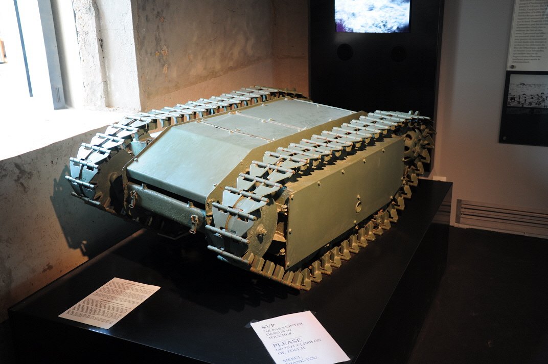 Musée d'Utah Beach